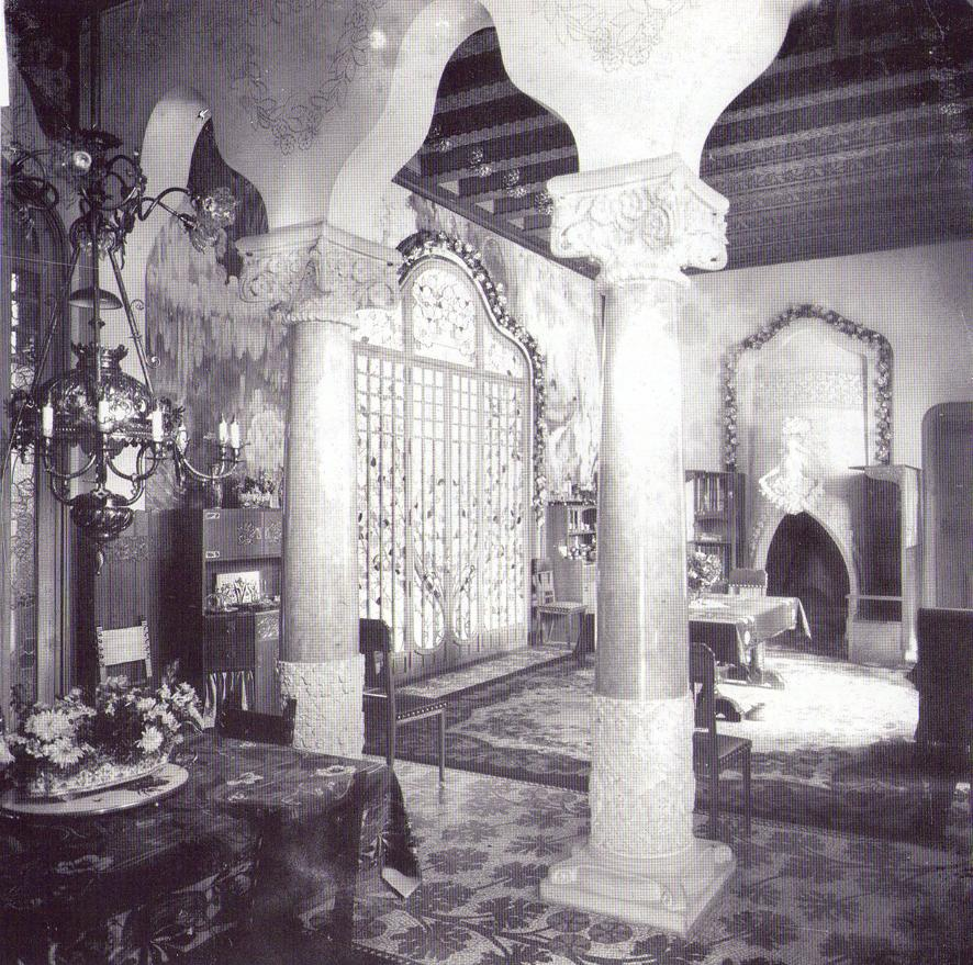 Casa Trinxet, característica del modernisme catalán, estuvo ubicada en Calle Còrcega, 268, Barcelona, España.